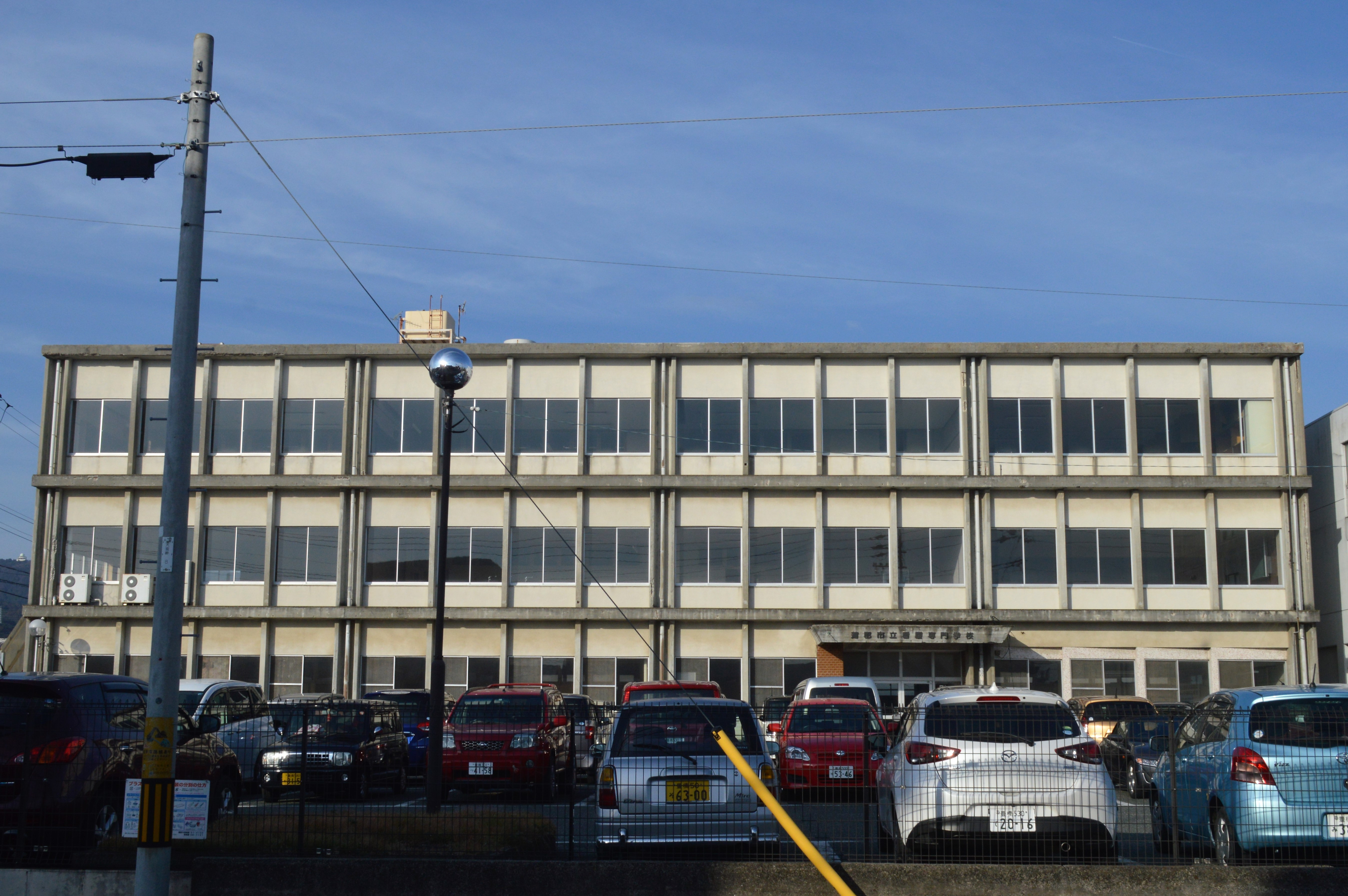 愛知県蒲郡市の蒲郡市立図書館別館。かつての蒲郡市立ソフィア看護専門学校（旧称は蒲郡市立看護専門学校）の建物。